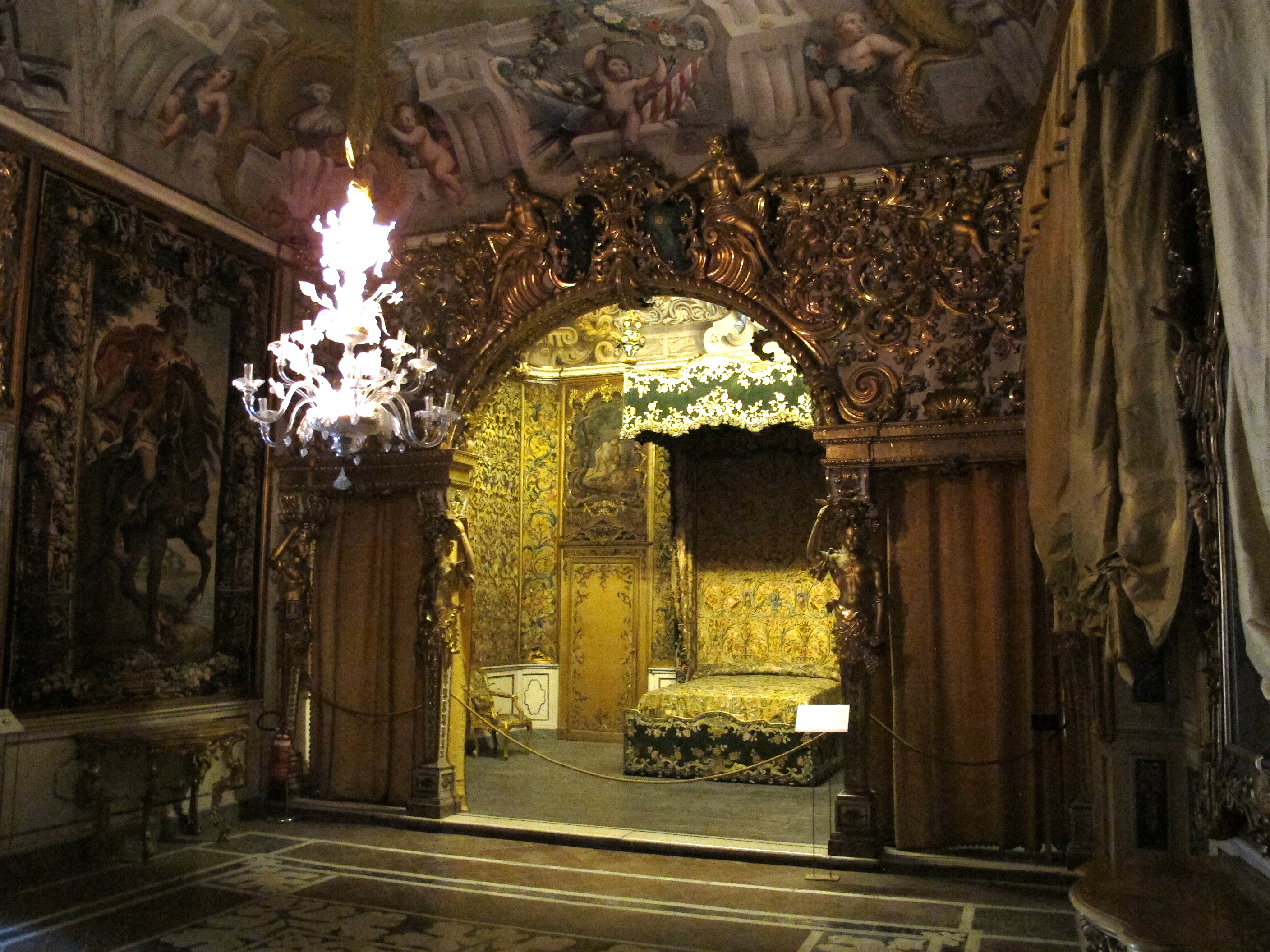 Pinacoteca e Museo di palazzo Mansi - MIBAC This is a photo of a monument which is part of cultural heritage of Italy.